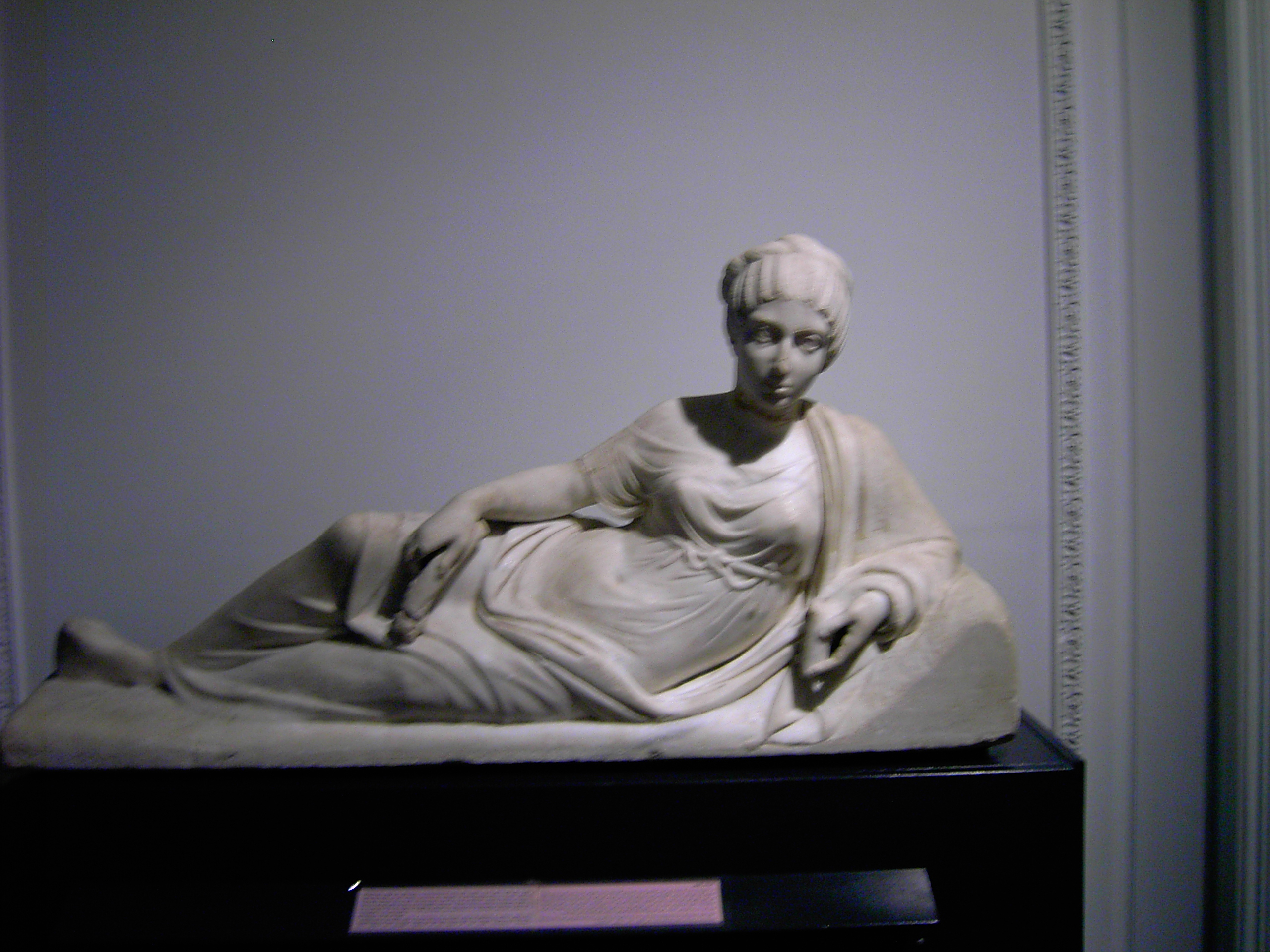 Photo personnelle prise au musée national d'Alexandrie